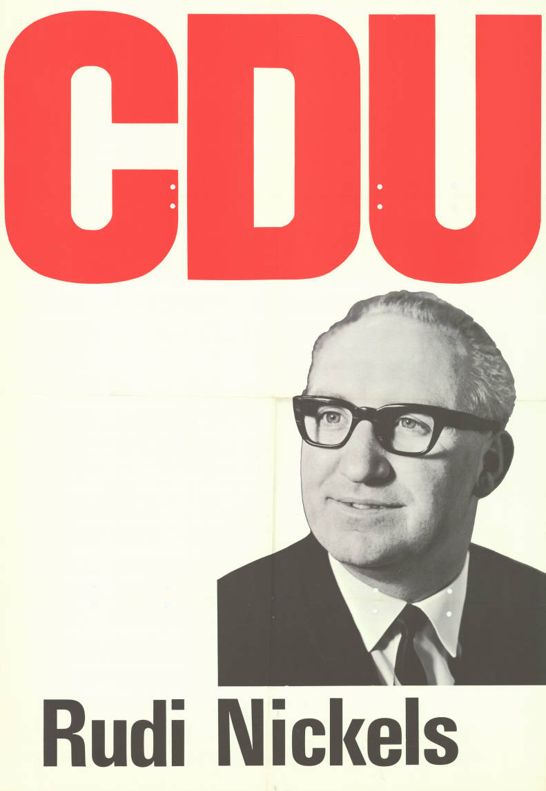 CDU Rudi Nickels Abbildung: Porträtfoto Plakatart: Kandidaten-/Personenplakat mit Porträt Objekt-Signatur: 10-009 : 529 Bestand: Landtagswahlplakate Nordrhein-Westfalen (10-009) GliederungBestand10-18: Landtagswahlplakate Nordrhein-Westfalen (10-009) » CDU Lizenz: KAS/ACDP 10-009 : 529 CC-BY-SA 3.0 DE